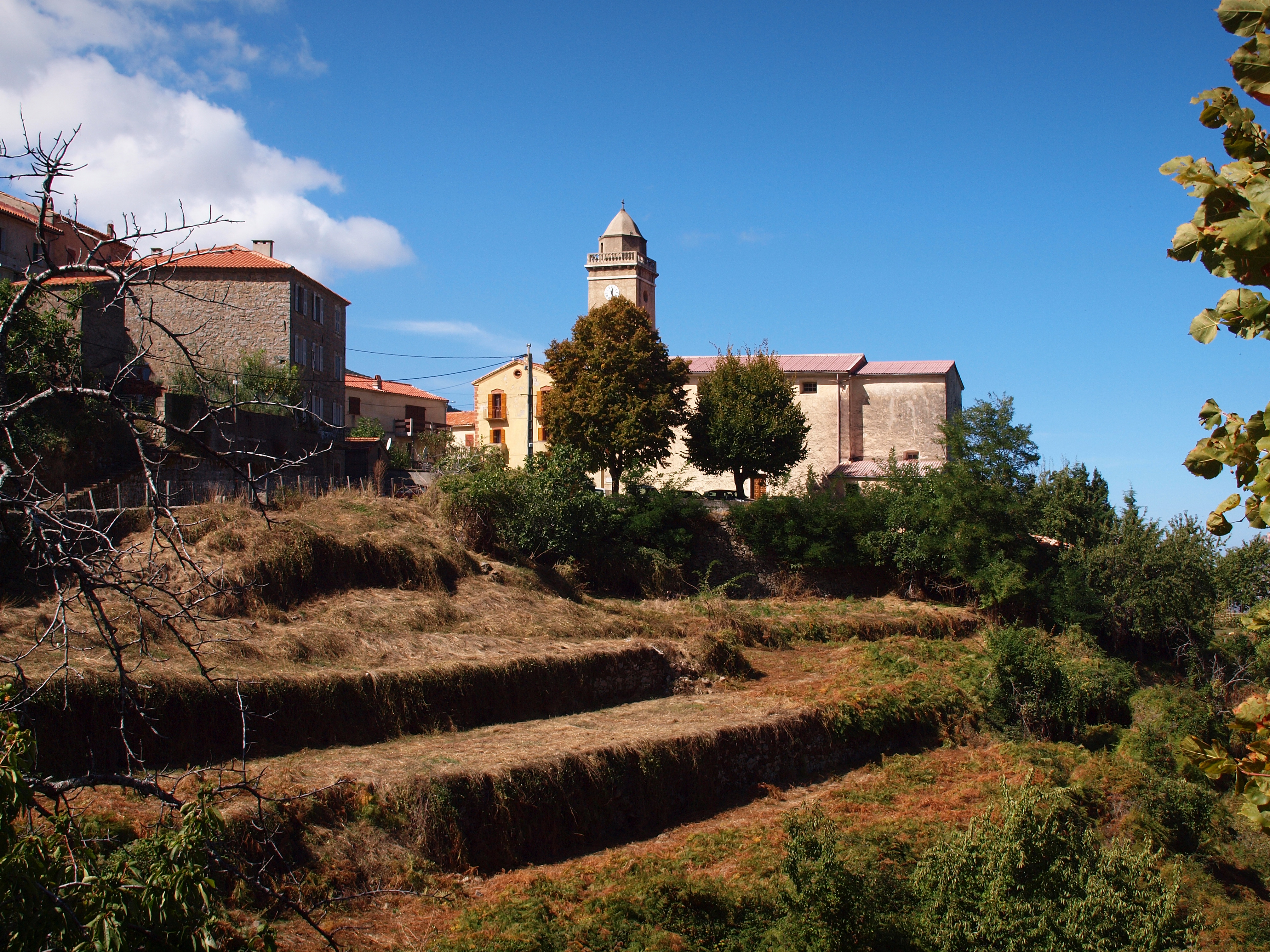 Marignana (Corse) - Vue latérale de l'église paroissiale Saint-Jacques